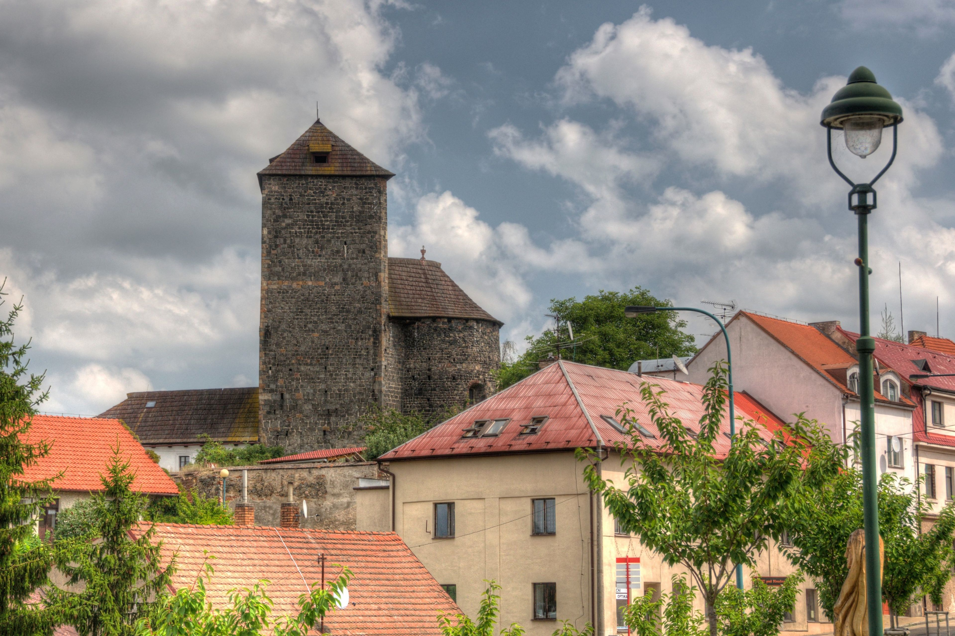 Pohled na hrad od západu